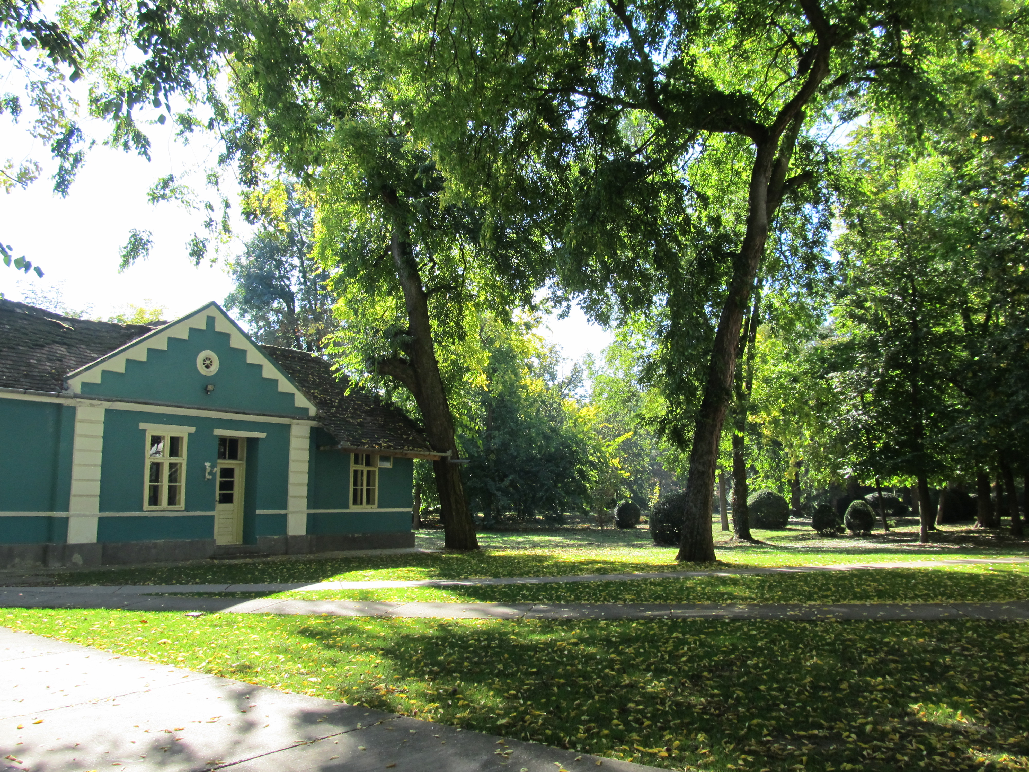 Данашњи изглед једне од помоћних зграда у комплексу дворца Дамаскин